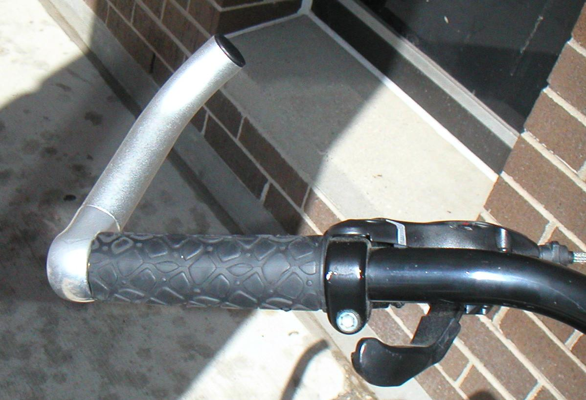 Mountain bike's left bar end